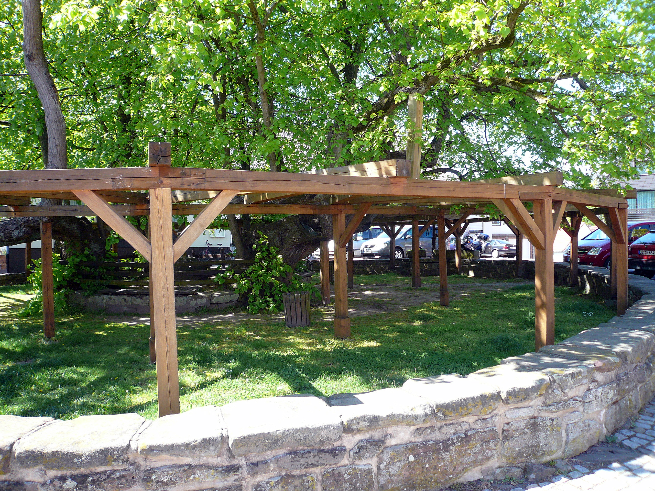 Lime in Schenklengsfeld, Germany